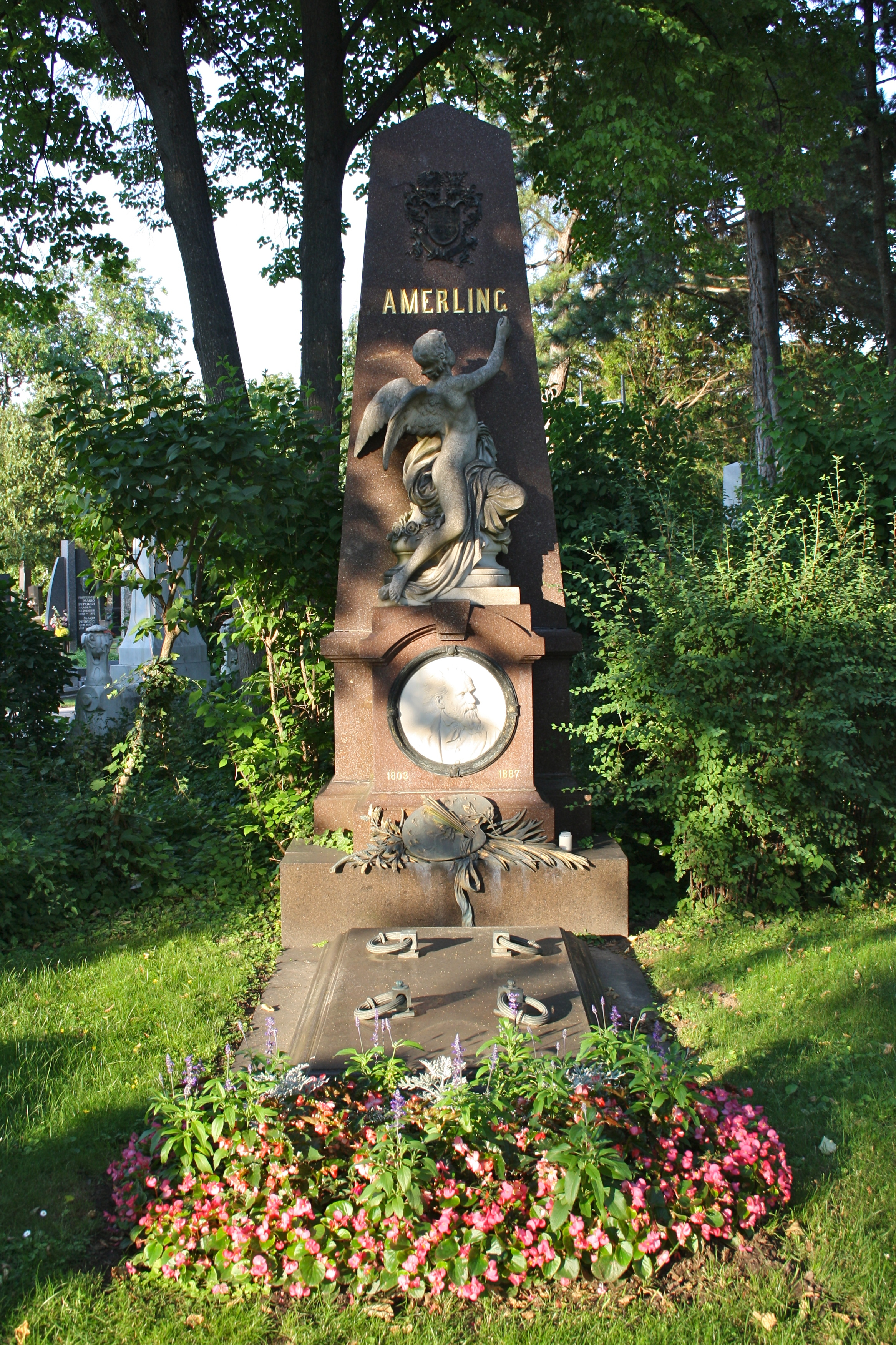 Grab von Friedrich von Amerling am Zentralfriedhof in Wien.